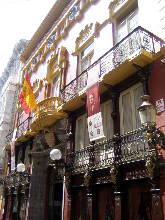 Casino de Cartagena, Obra modernista.